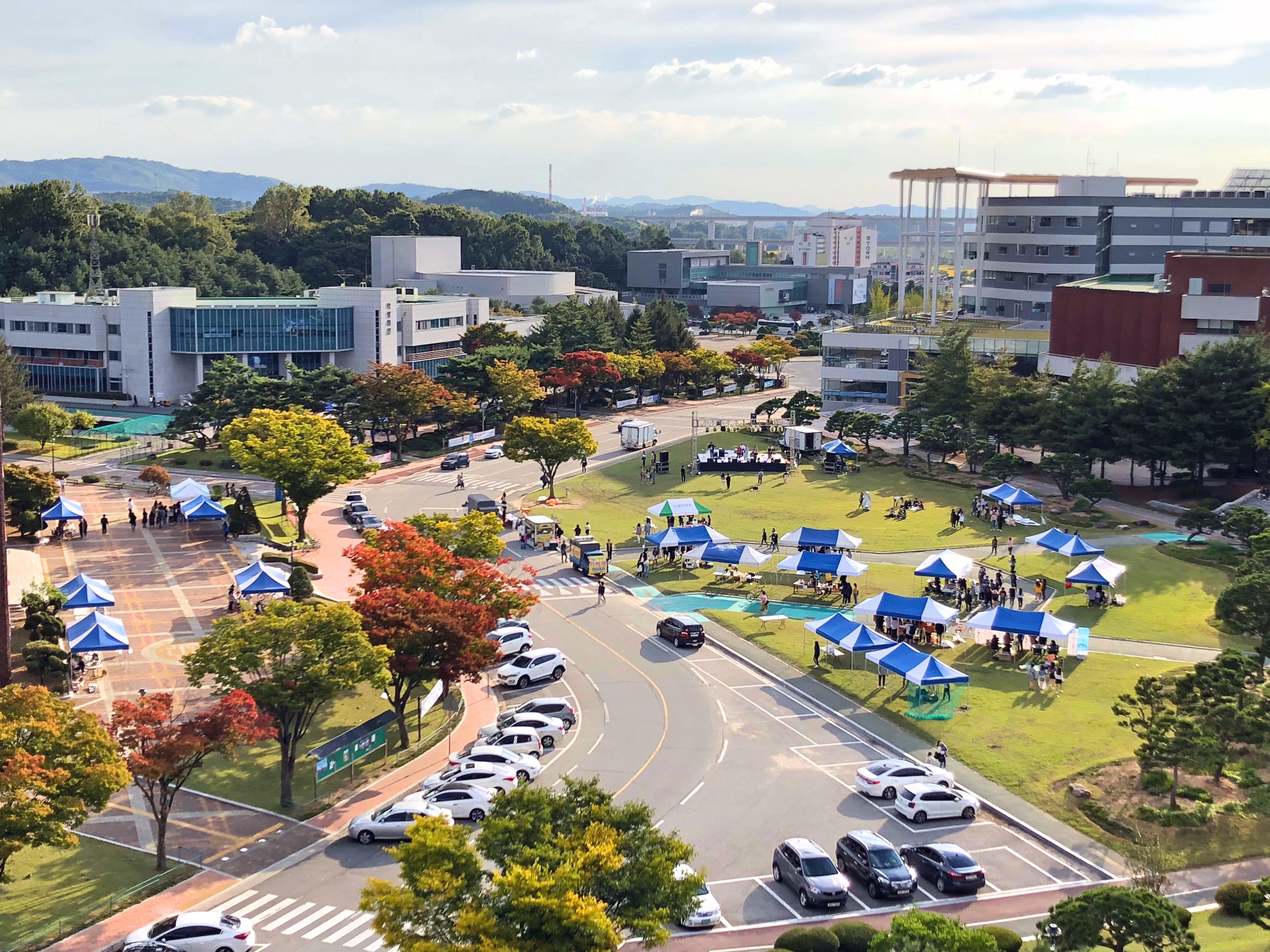 종합교육관에서 6층에서 바라본 인문과학관 앞 잔디광장의 축제 모습.